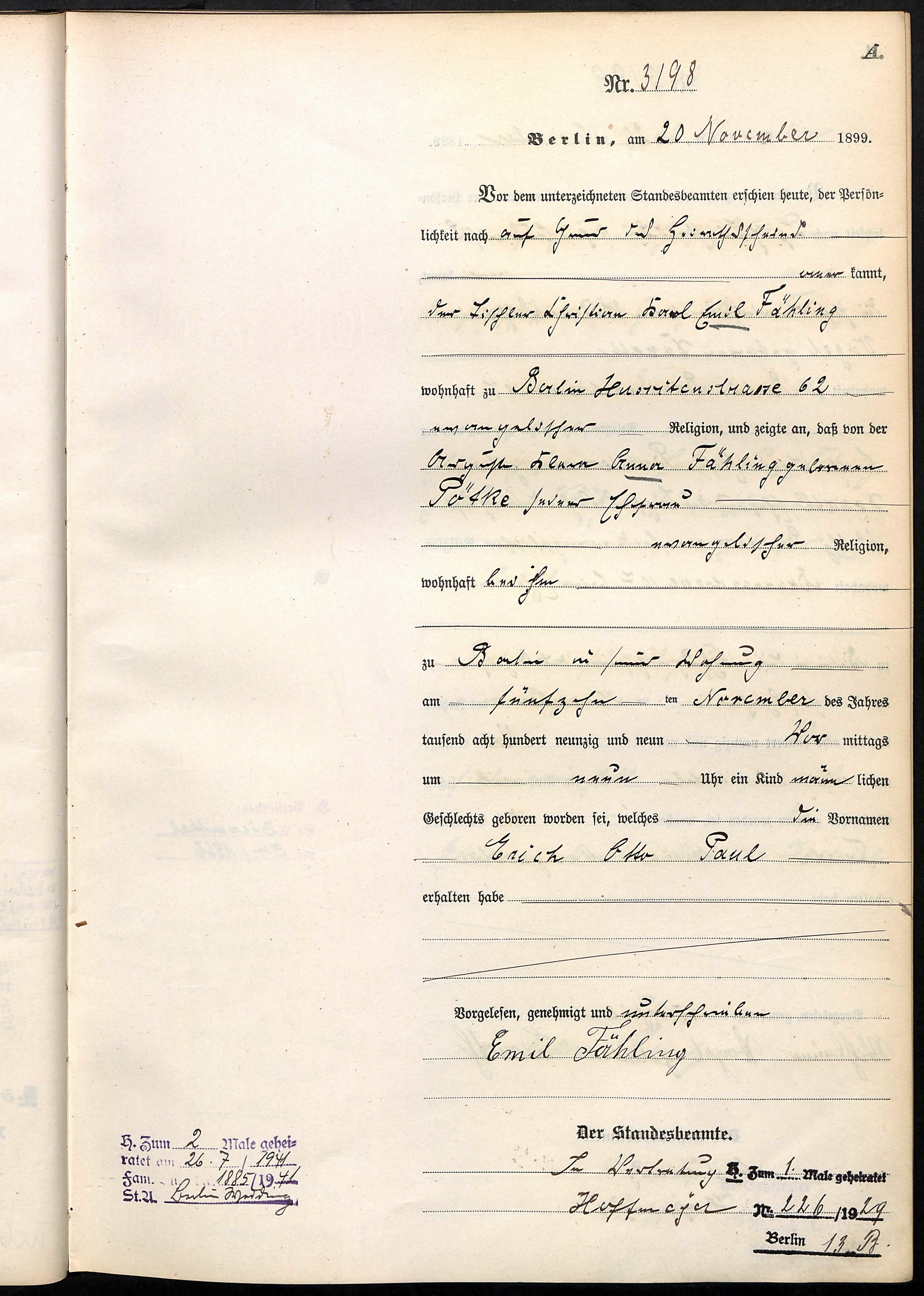 Es handelt dich um die von Erich Fähling